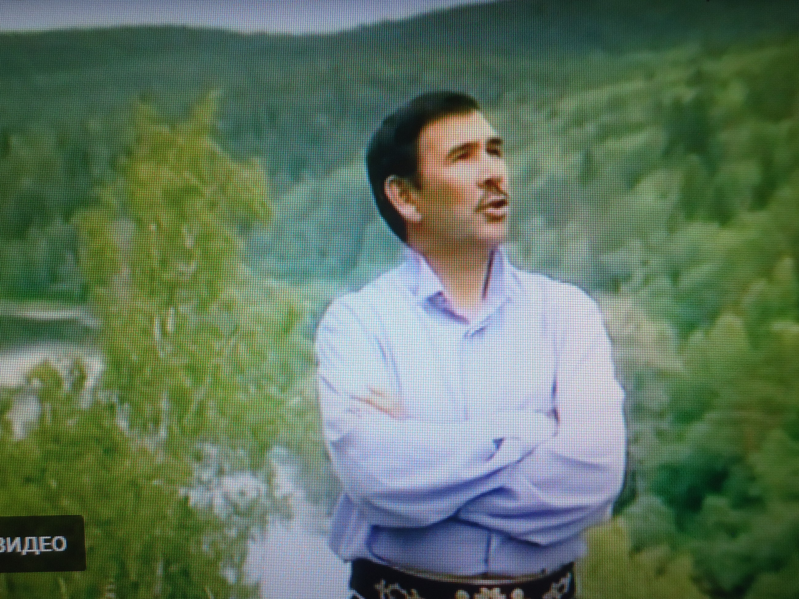 Башҡортса: Йырсы Харрасов Рауил. Башҡортостандың атҡаҙанған мәҙәниәт эшмәкәре.